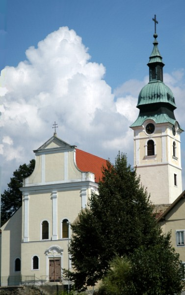 Pfarrkirche zum Hl. Martin in Sitzendorf an der Schmida, Ansicht von Südwesten am frühen Nachmittag